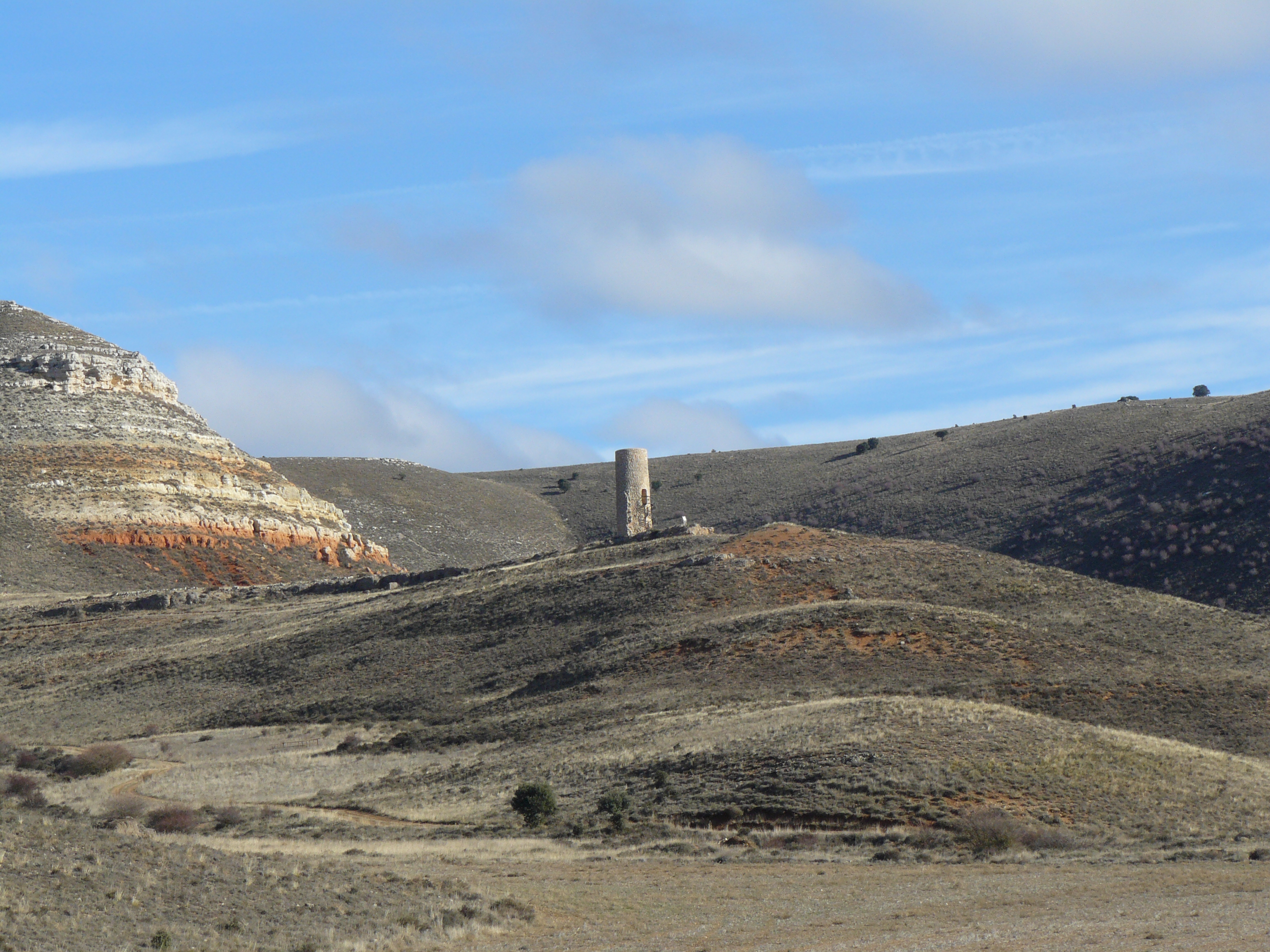 Atalaya islámica de La Veruela, Caltojar, Soria.